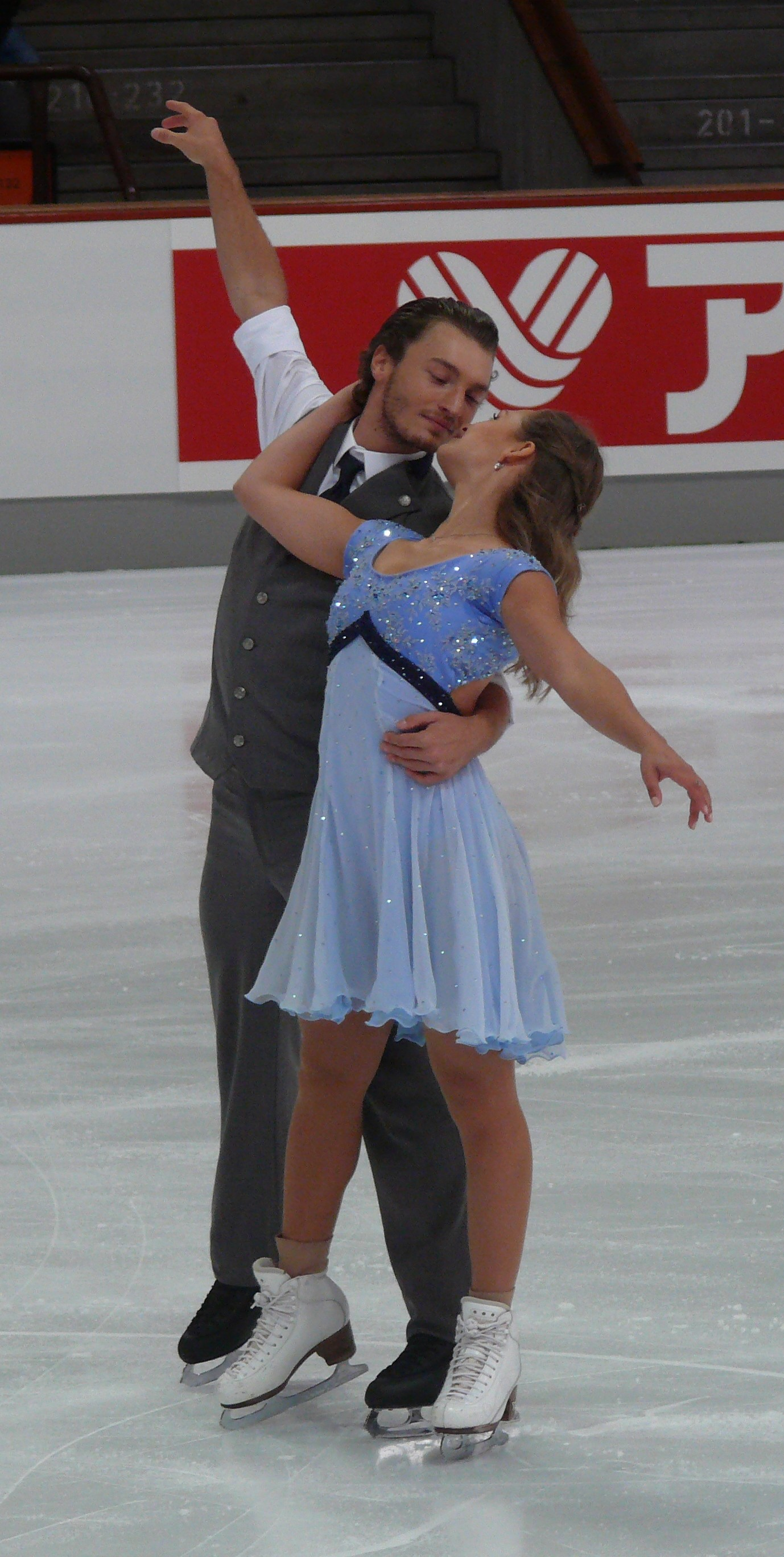 Kavita Lorenz und Joti Polizoakis bei der Nebelhorn Trophy 2015